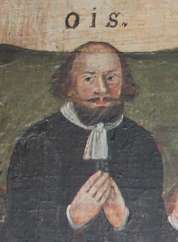 Porträtt av Olof Jonsson, riksdagsmanen och häradsdomaren i Bankekind, Östra Skrukeby kyrka.